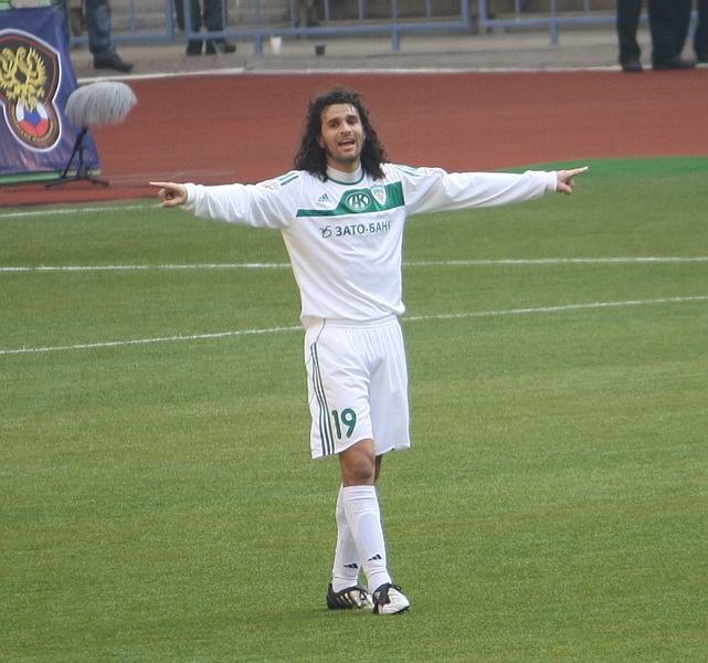 Héctor Bracamonte